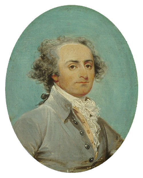 Portrait of Giuseppe Ceracchi (1751-1801), Italian sculptor